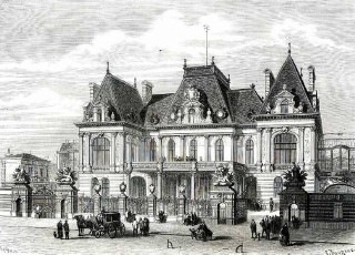 Hôtel Basilewsky (aka Palais de Castille) a l'avenue du Roi-de-Rome